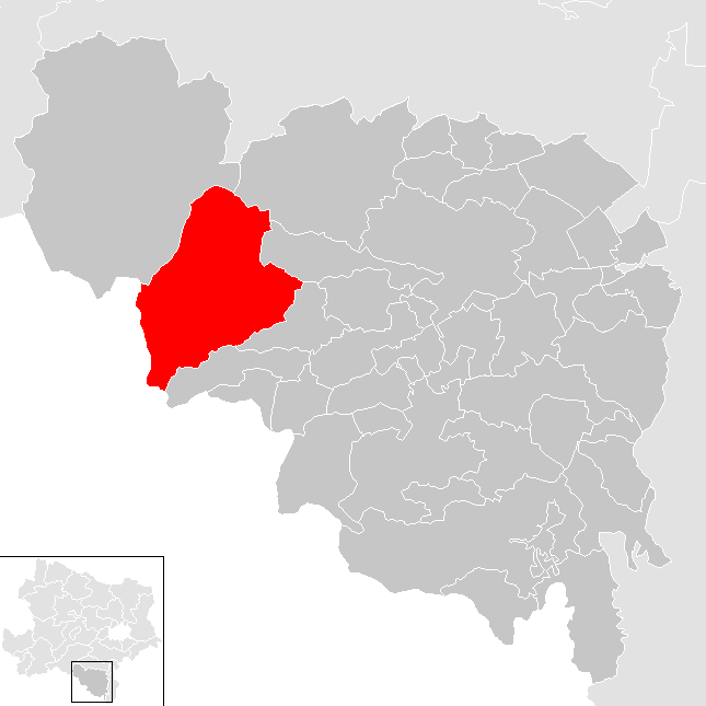 Bezirk Neunkirchen